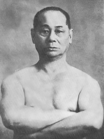 本部朝基(Motobu Choki, 1870 - 1944)